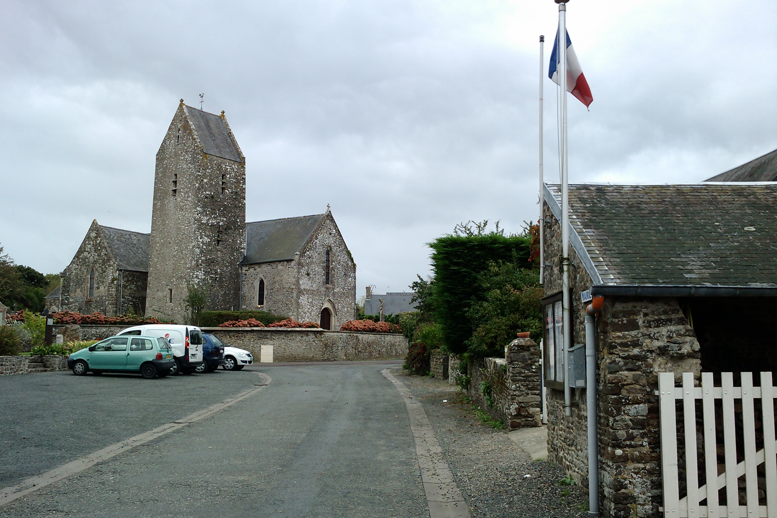 Canville-la-Rocque avec Église Saint-Malo au fond